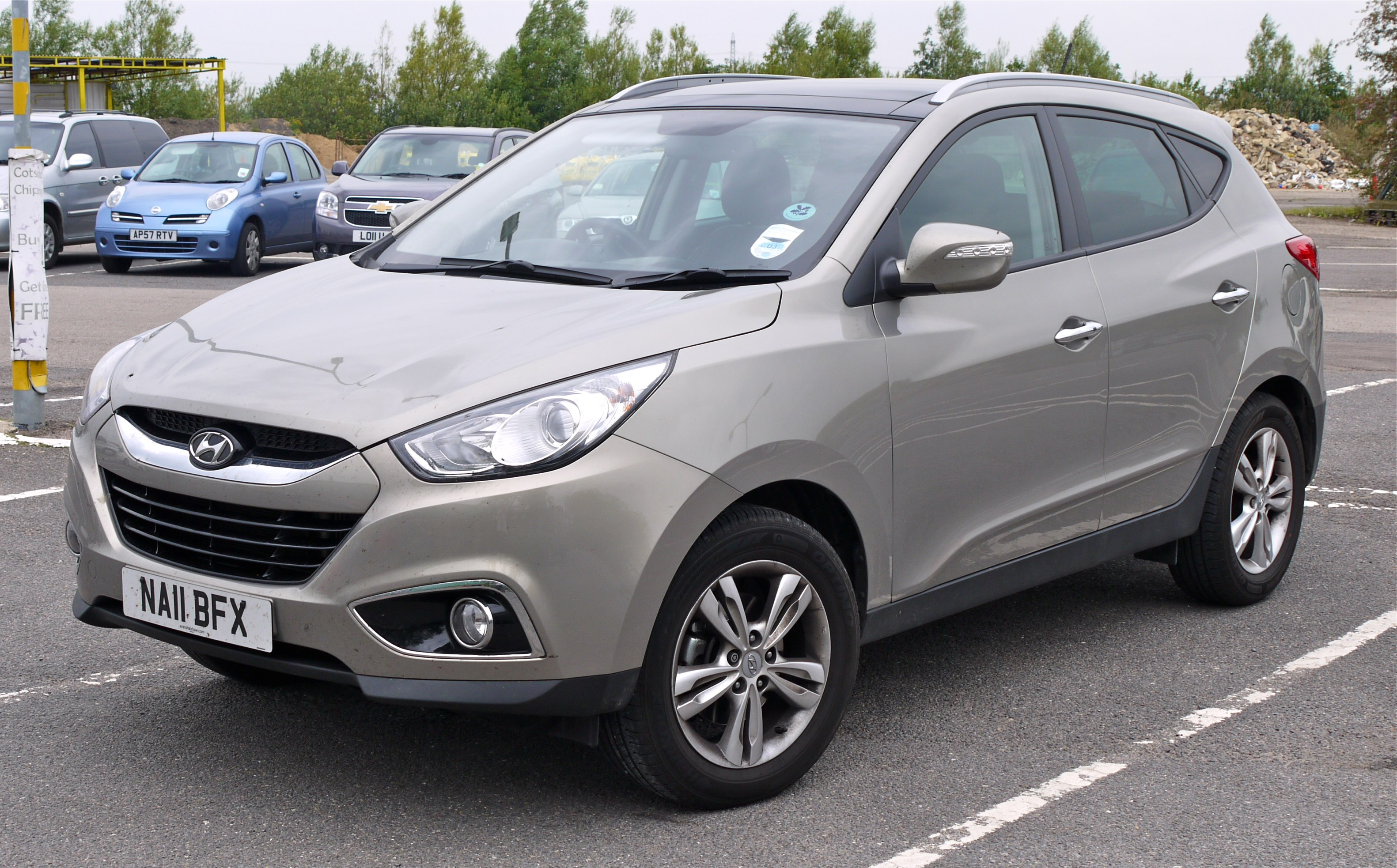 Panasonic G1 14-45 Lens iA mode